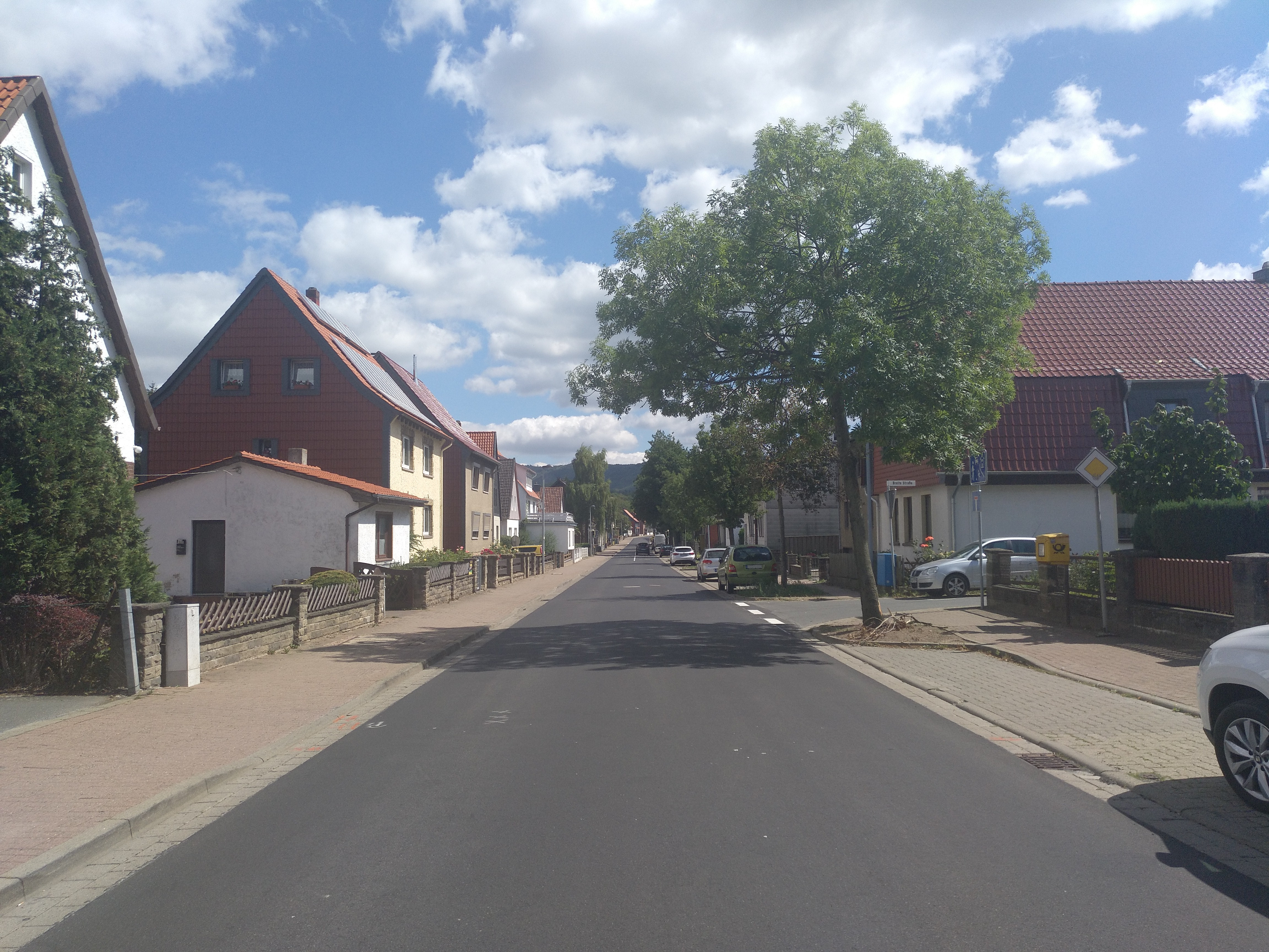 Die Breite Straße in Schlewecke, frisch asphaltiert.